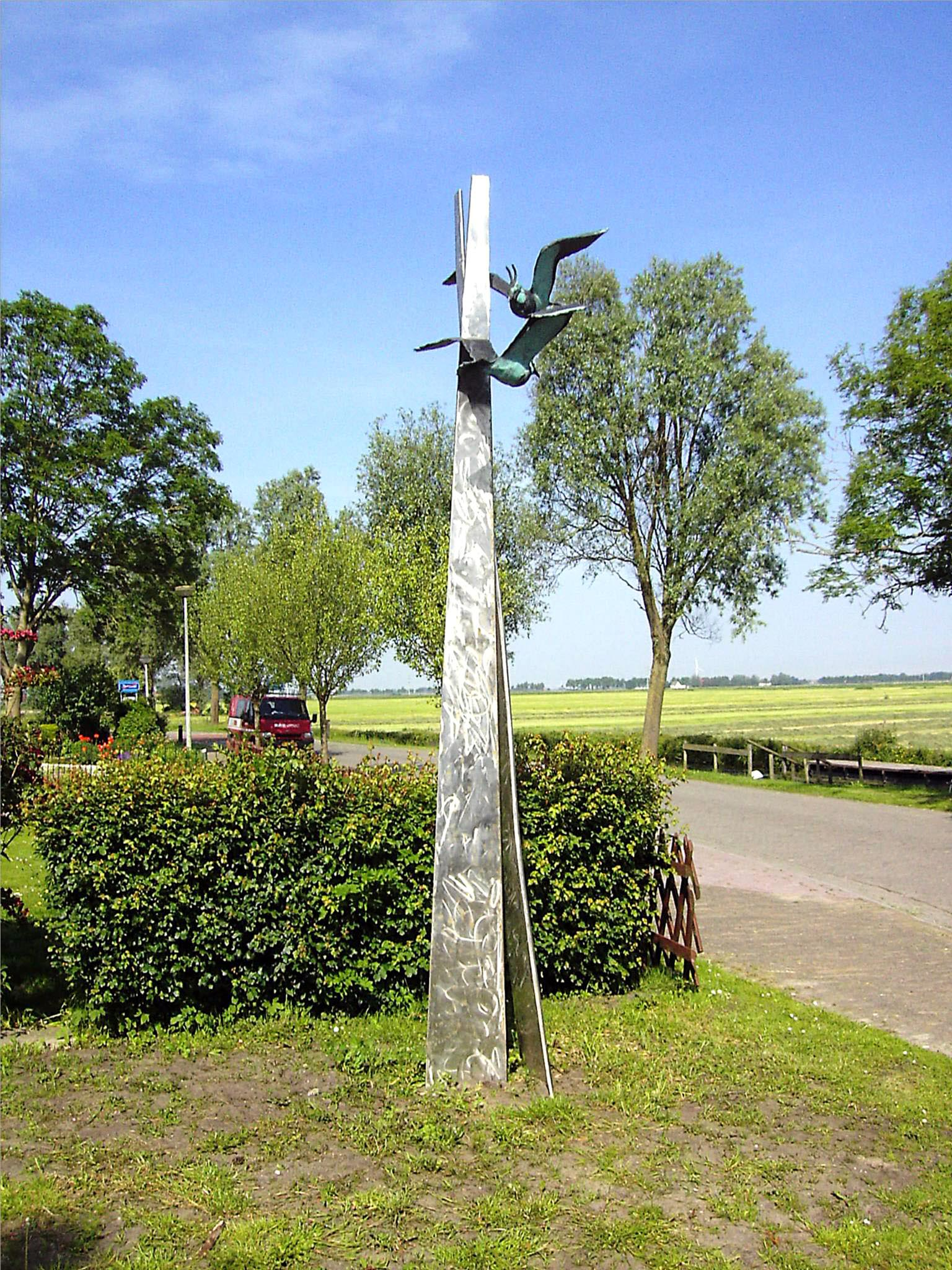 Hans Jouta,2006